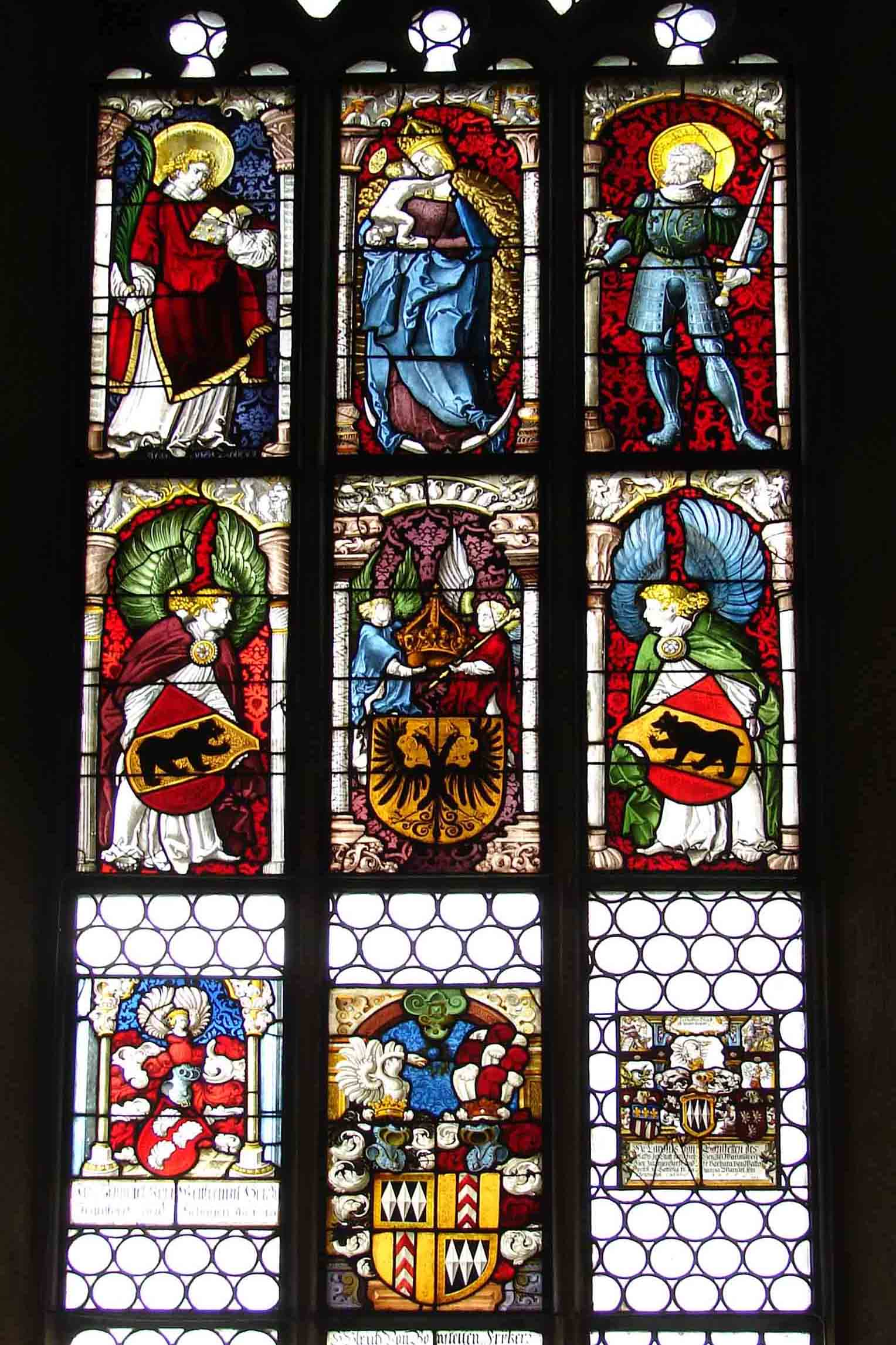 Kirche Jegenstorf, Fensterbild mit Stifterwappen Bern, v.Wattenwil und v.Bonstetten